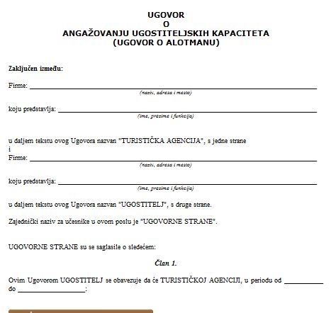 primer kako izgleda alotman